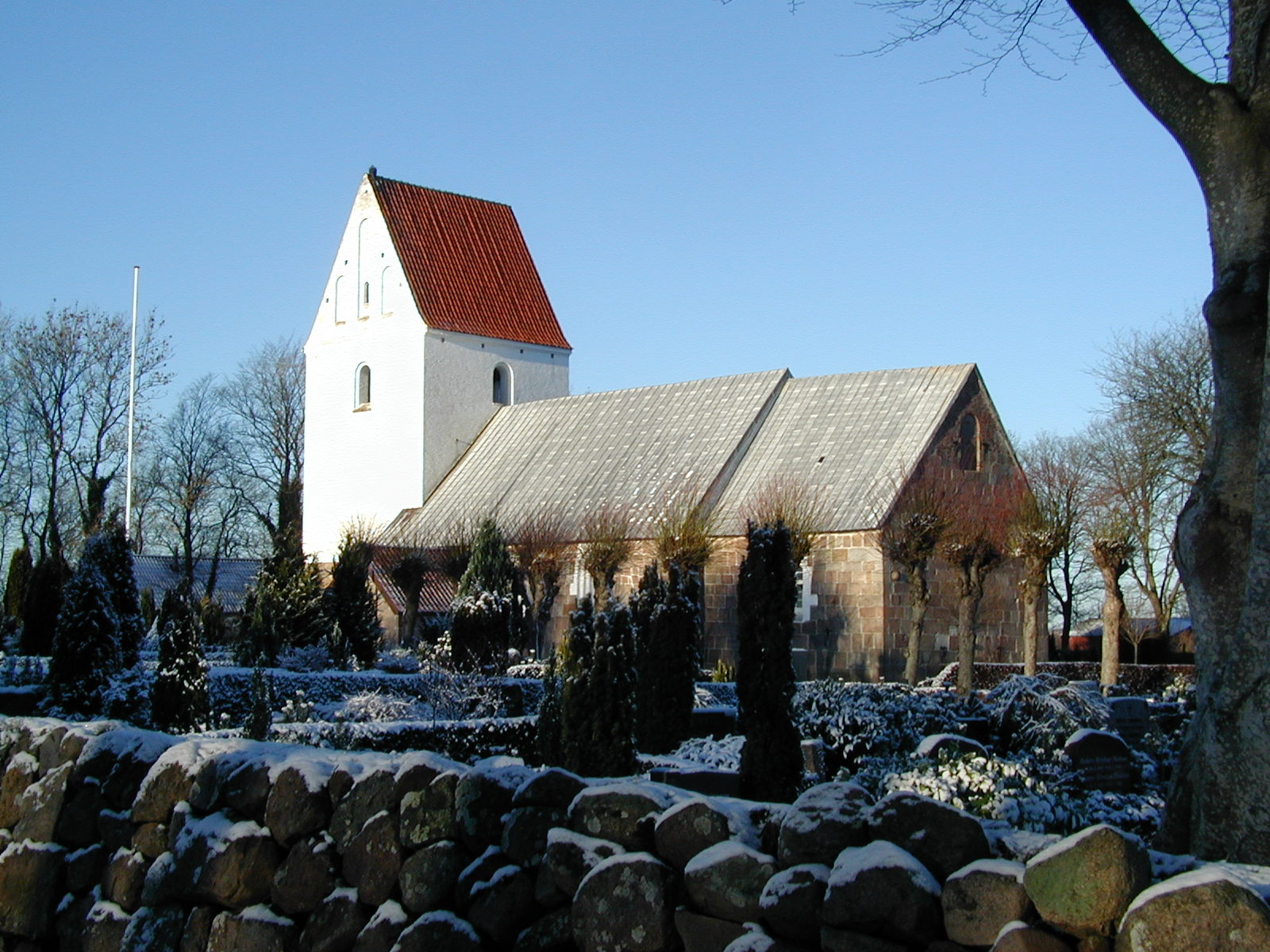 Faster Kirke